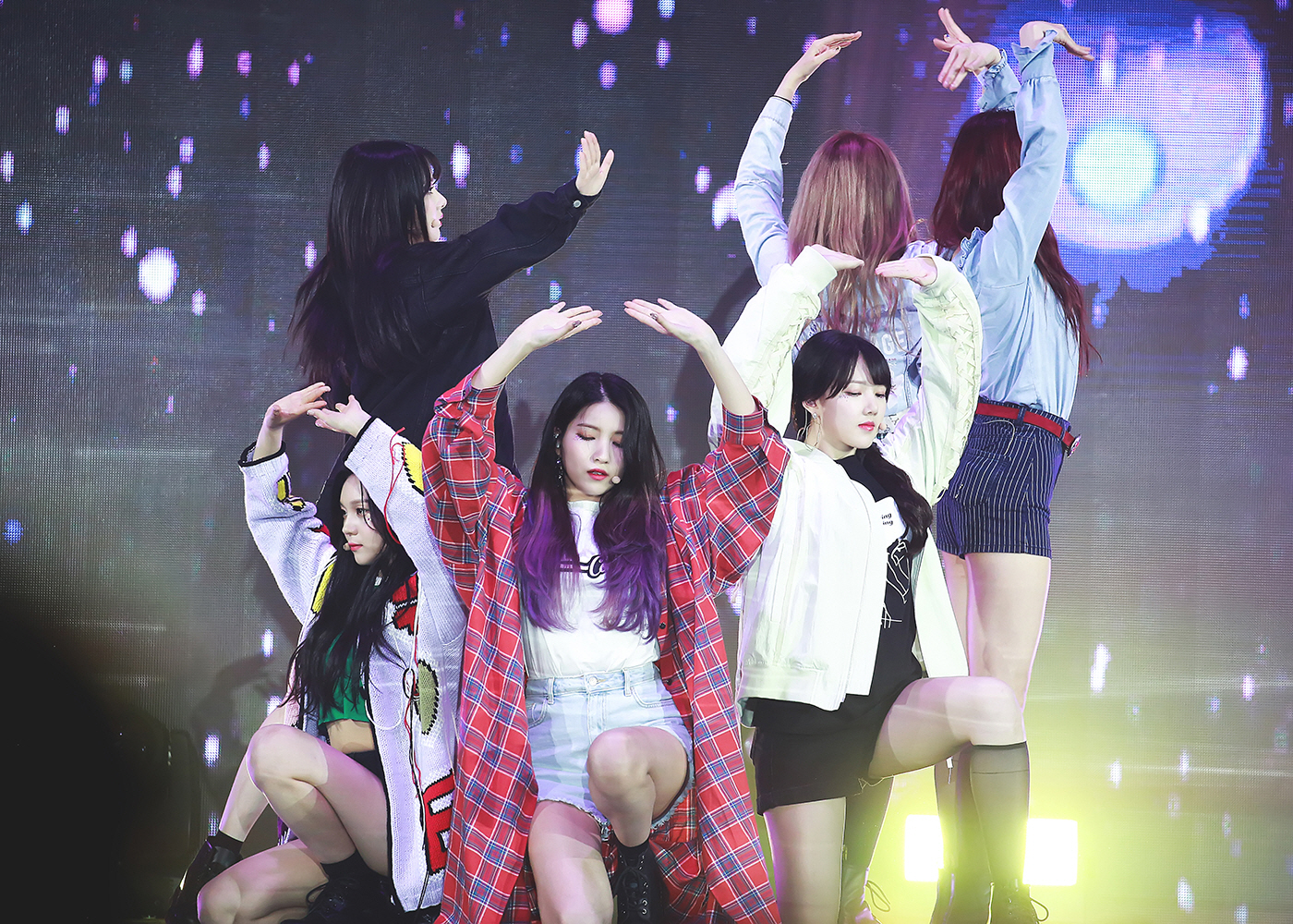 180506 아시아모델어워즈 여친